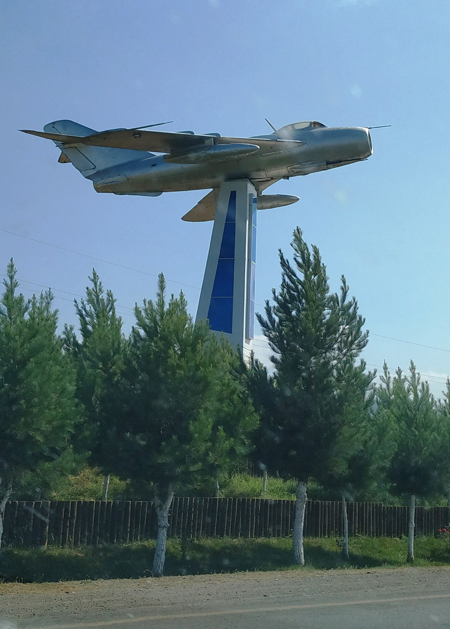 Fərrux ağa Qayıbov abidəsi (Qazax)